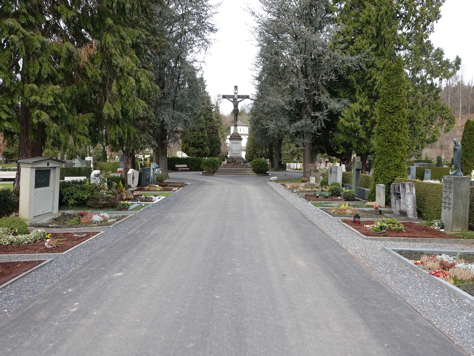 Friedhof Friedental, Zentralachse mit Kreuz